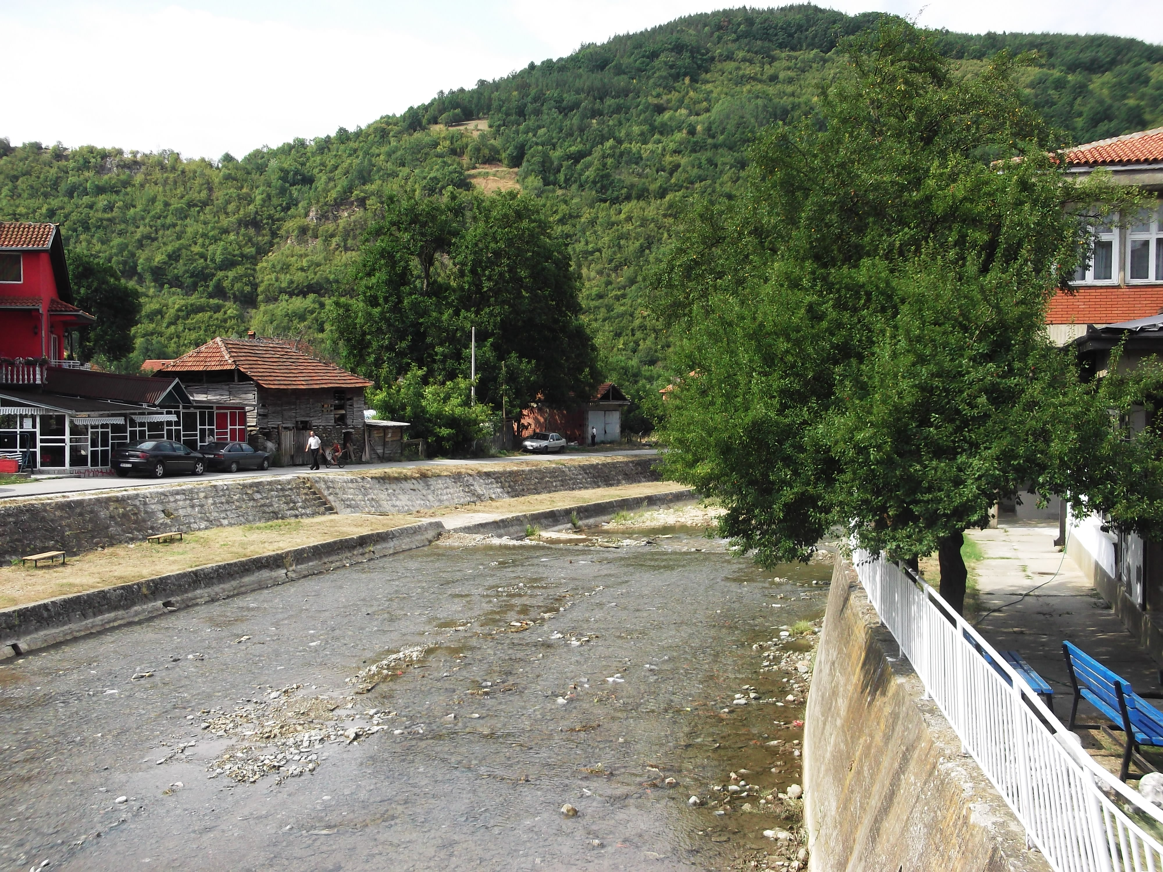 Reka Pčinja u Trgovištu